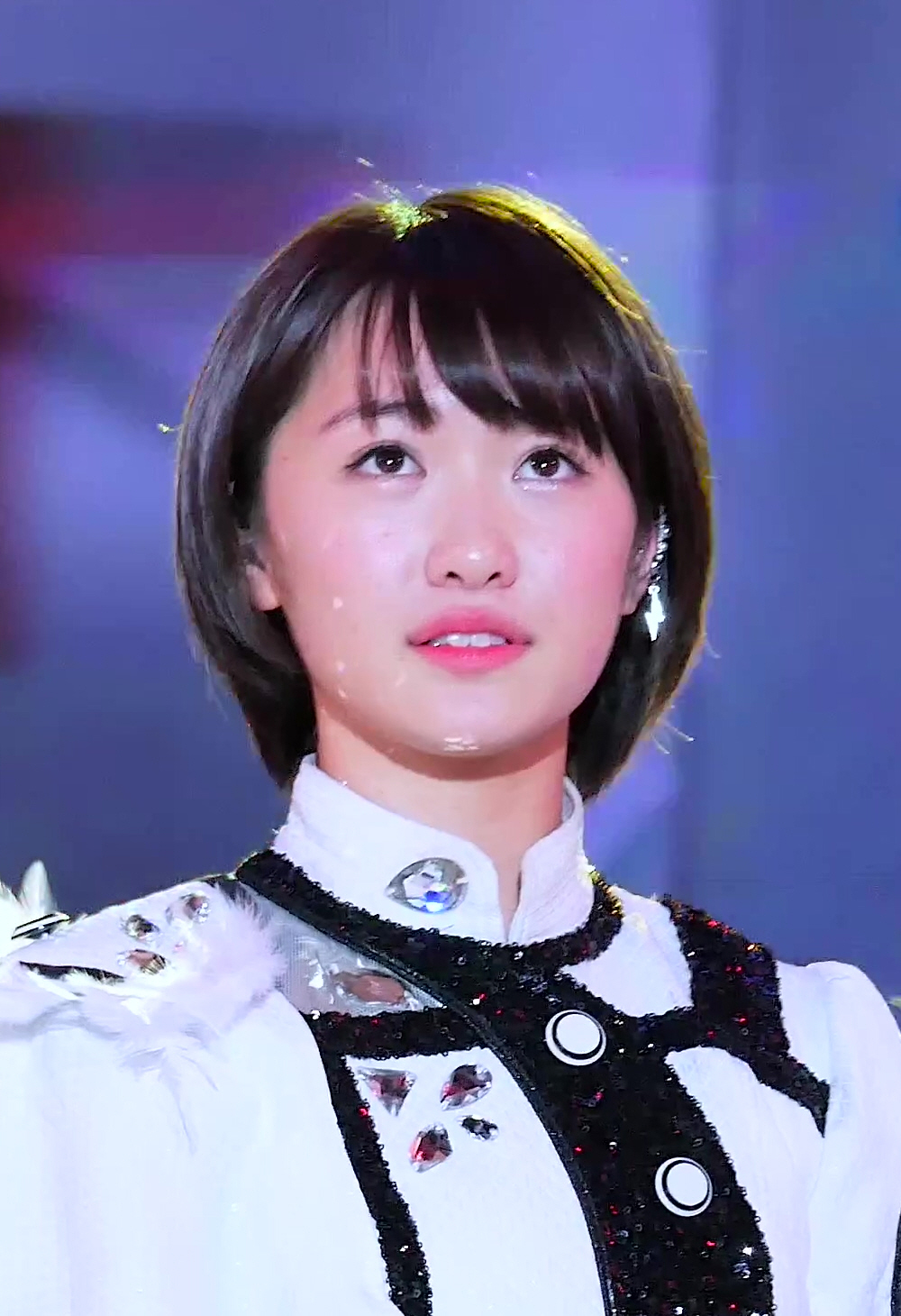 161006 AMN 빅 콘서트 - 마키노 마리아 모닝구무스메 메들리 직캠